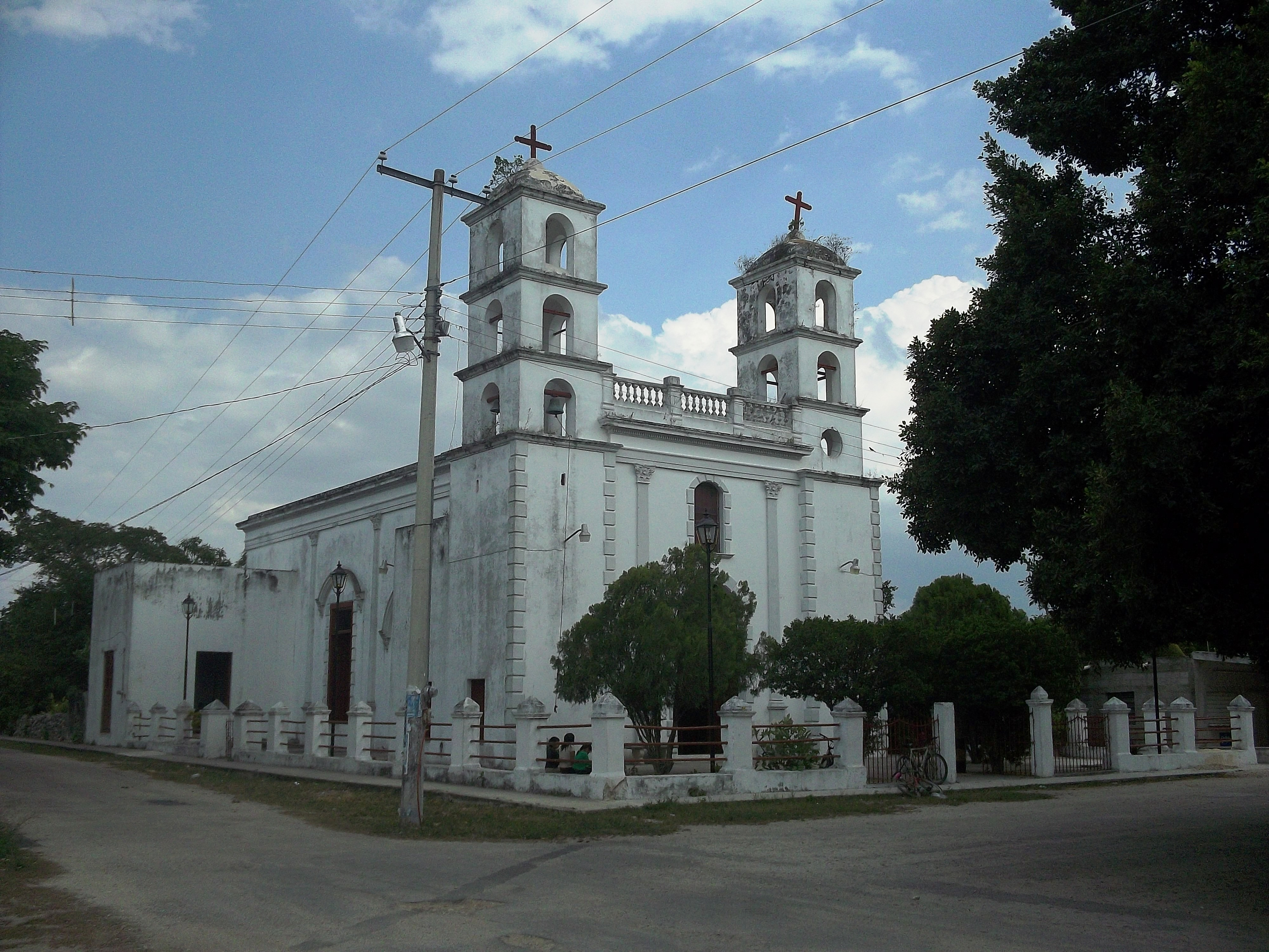 Iglesia de Yaxché de Peón, Yucatán.